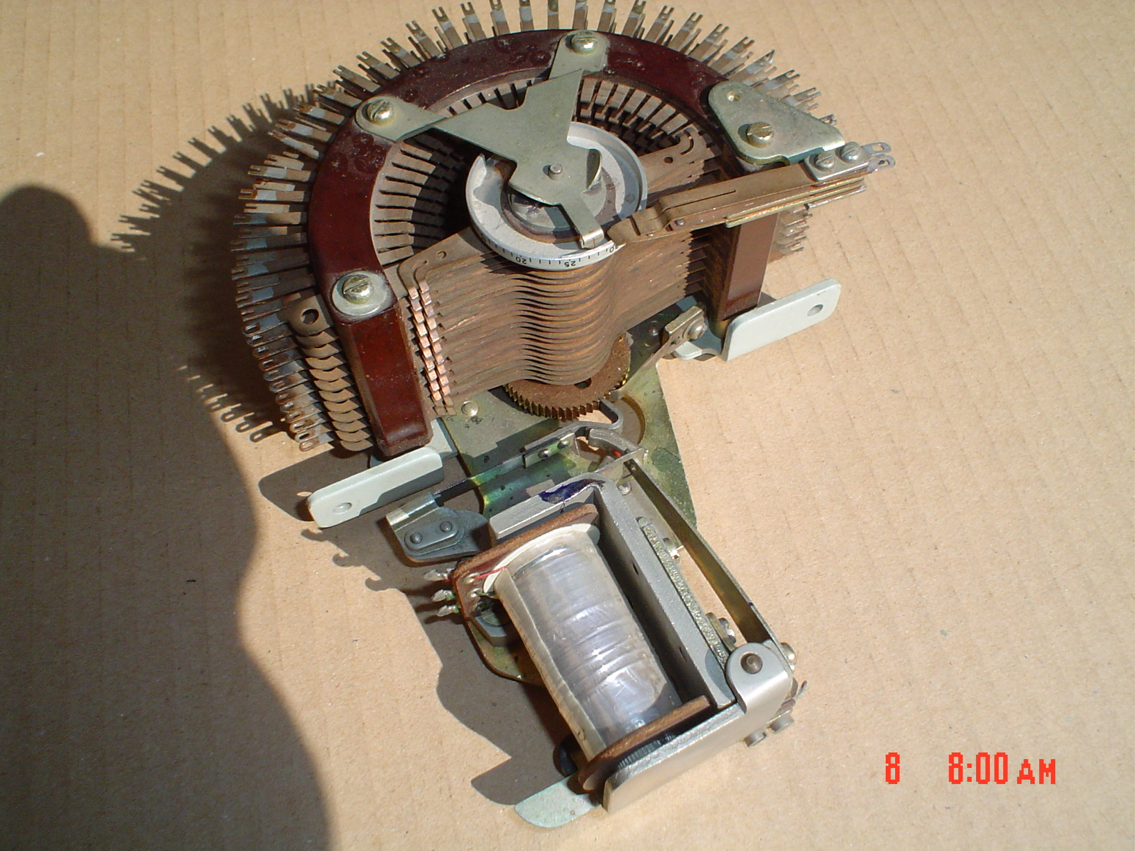 Ĝi paŝadas per daŭra kurento.